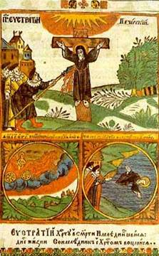 Распятие прмч. Евстратия. Вознесение души святого. Иудеи бросают тело святого в море. Ксилография. Мастер Илия (Патерик, или Отечник, Печерский. К., 1661)